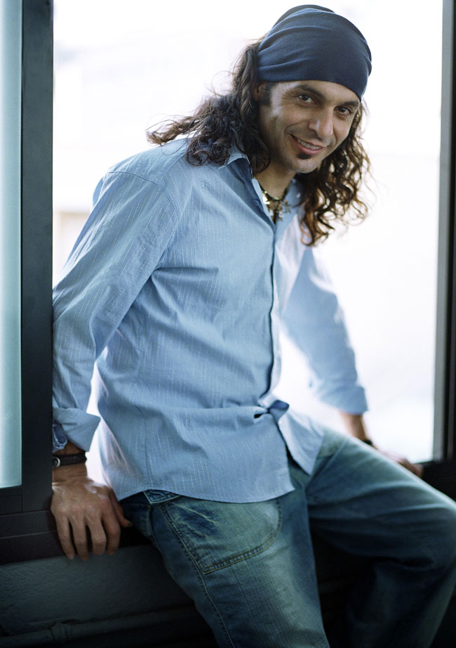 El músico español Javier Labandón, más conocido por "El Arrebato"